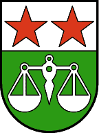 Fontanella, Vorarlberg: Im quergeteilten Schild zwei fünfzackige rote Wallisersterne im oberen silbernen Feld und eine zweiarmige silberne Waage im unteren grünen Feld. (auch: In Silber und Grün geteilt. Oben zwei fünfzackige rote Sterne, unten eine silberne Balkenwaage.; Verleihung: 27. Jänner 1970)